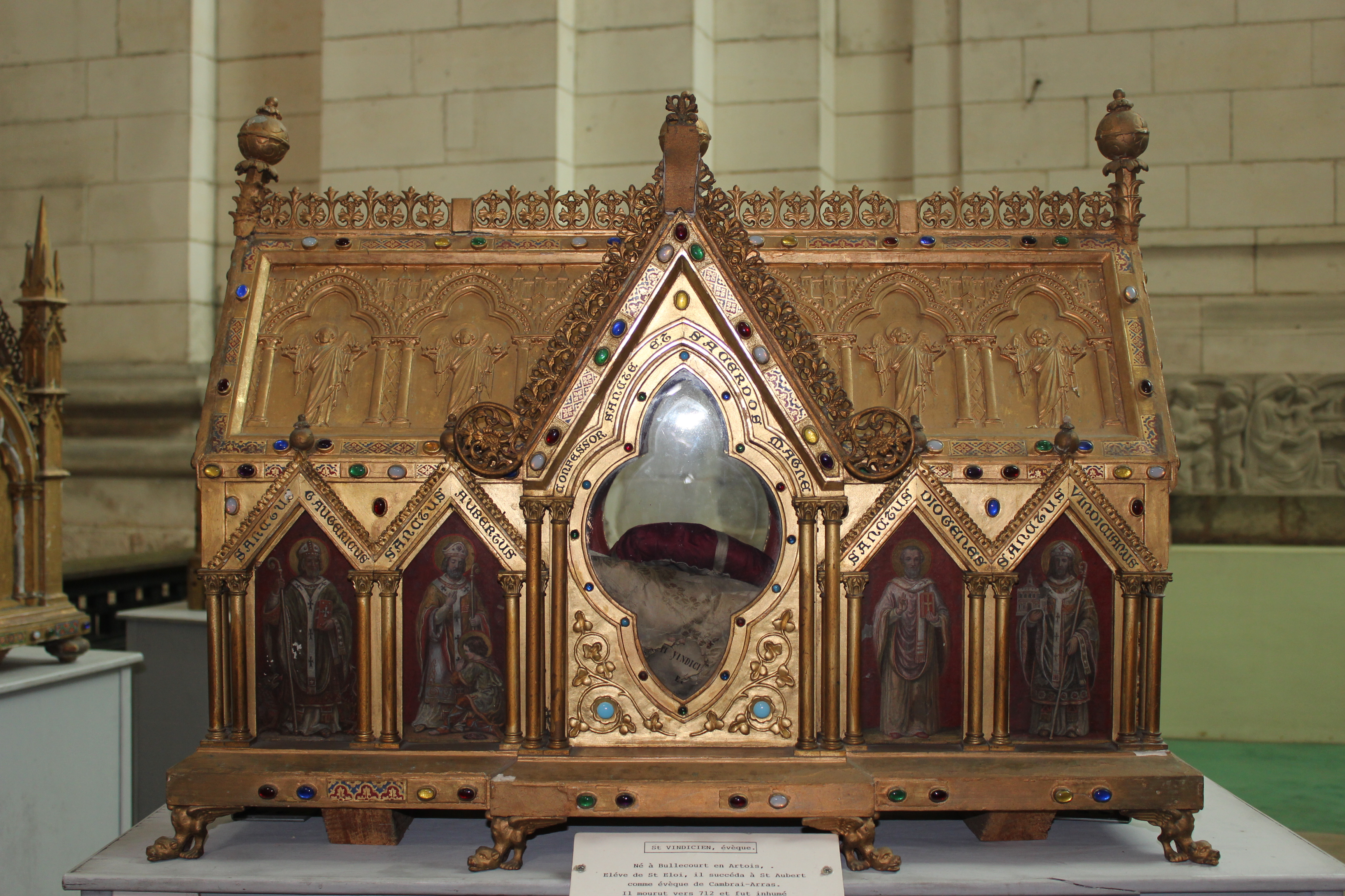 Arras (62) La cathédrale Les reliquaires 6 reliquaires provenant de l'abbaye Saint Vaast et de l'ancienne cathédrale contiennent les reliques de Saint Vaast, premier évêque d'Arras, de Saint Aubert et celles d'autres saints connus de la région